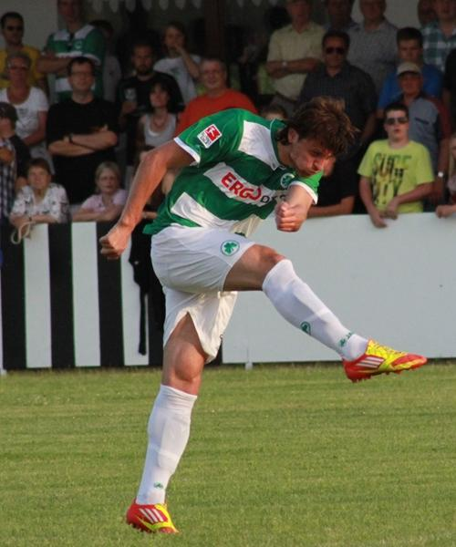 Ilir Azemi